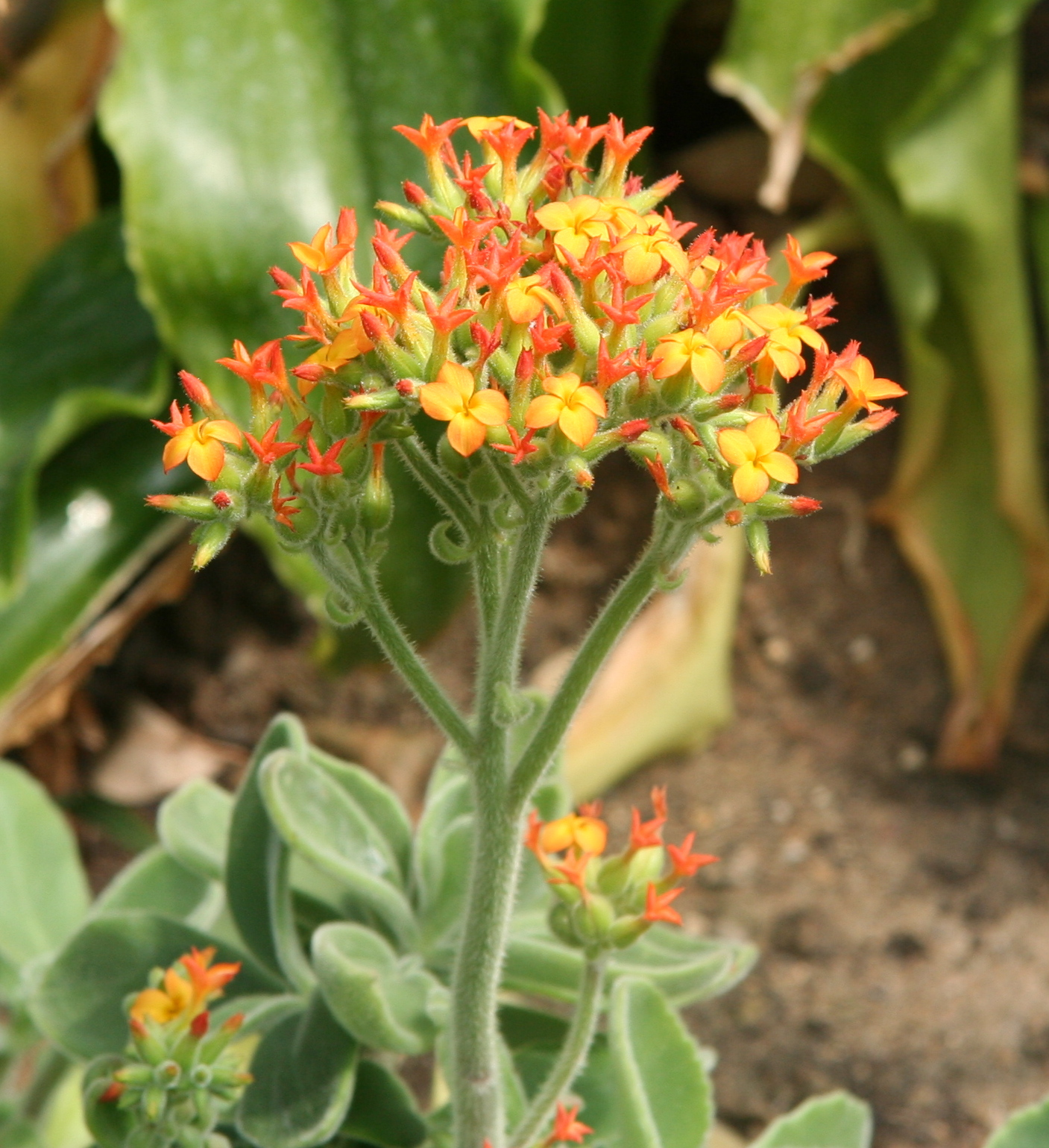 Kalanchoe lateritia var. zimbabwensis im Alten Botanischen Garten Hamburg